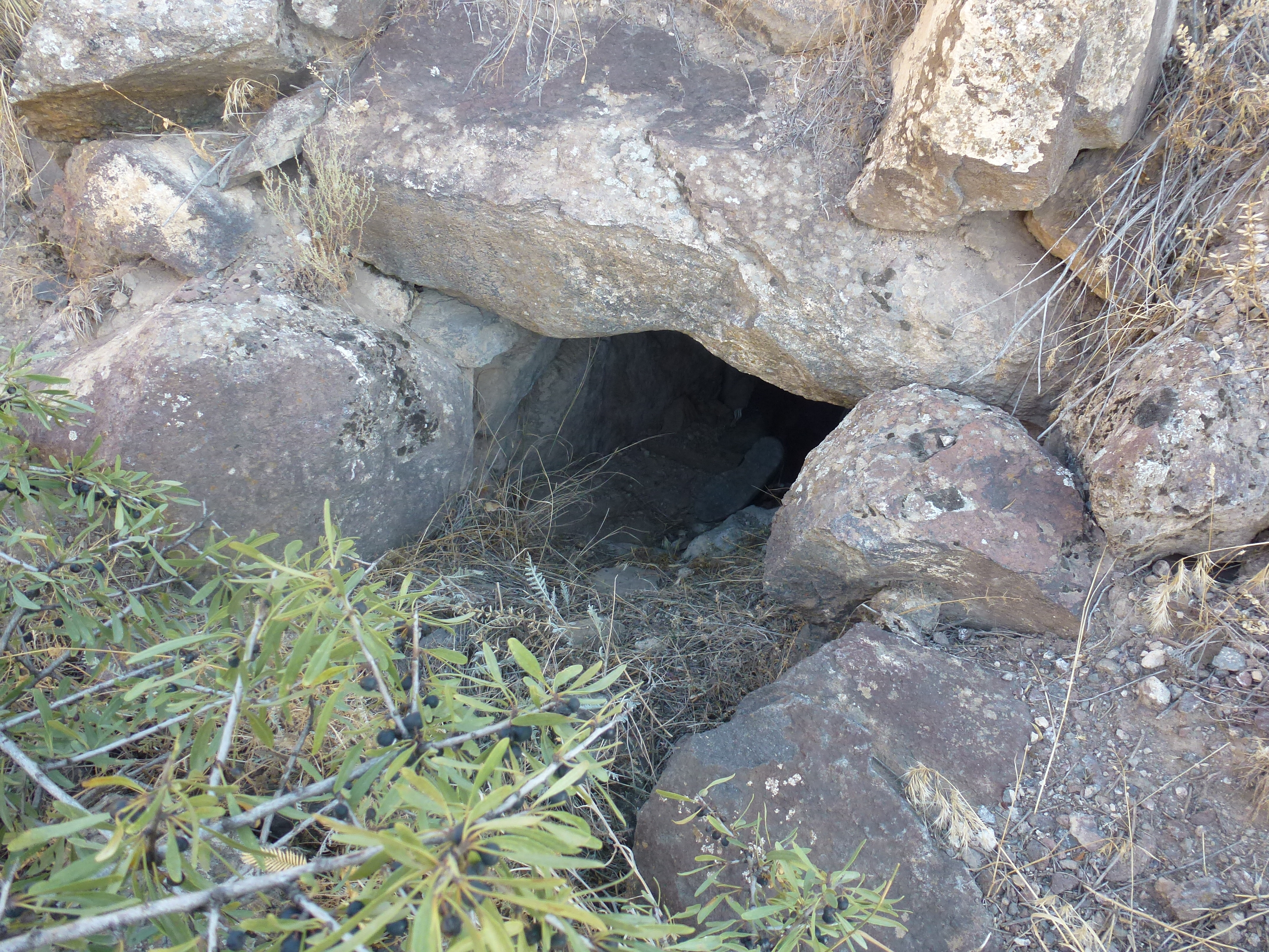 Ուջան, Արագածոտնի մարզ, քարայր-կացարան «Ղազարի» 13-18 դդ. 109/13.1